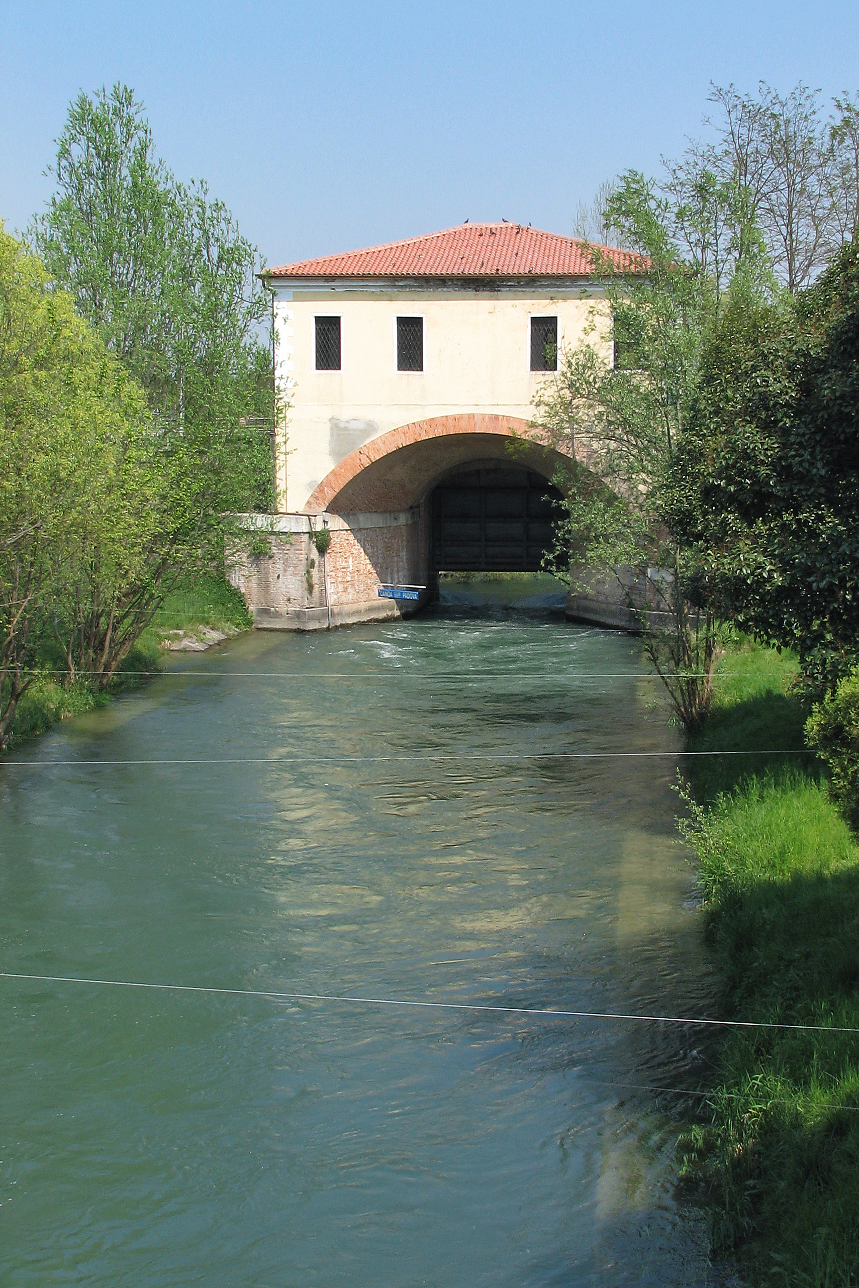 Il primo dei Colmelloni di Limena sotto cui scorre il canale Brentella.